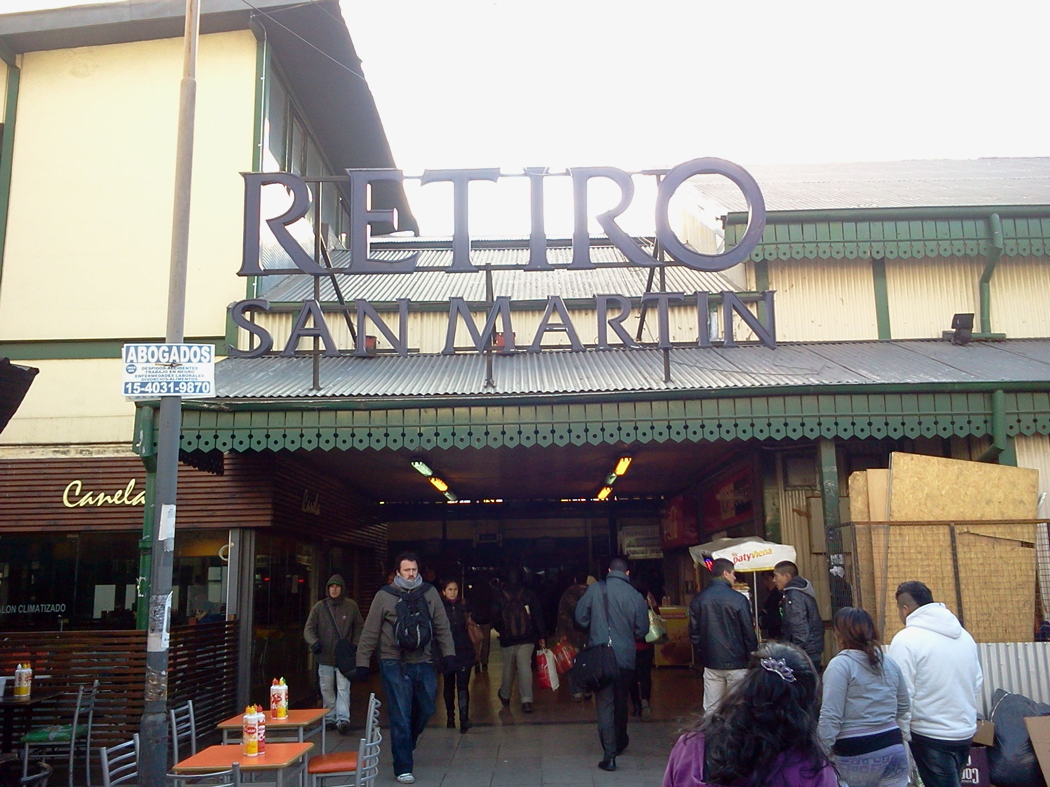 Entrada Alternativa por un costado de la estación